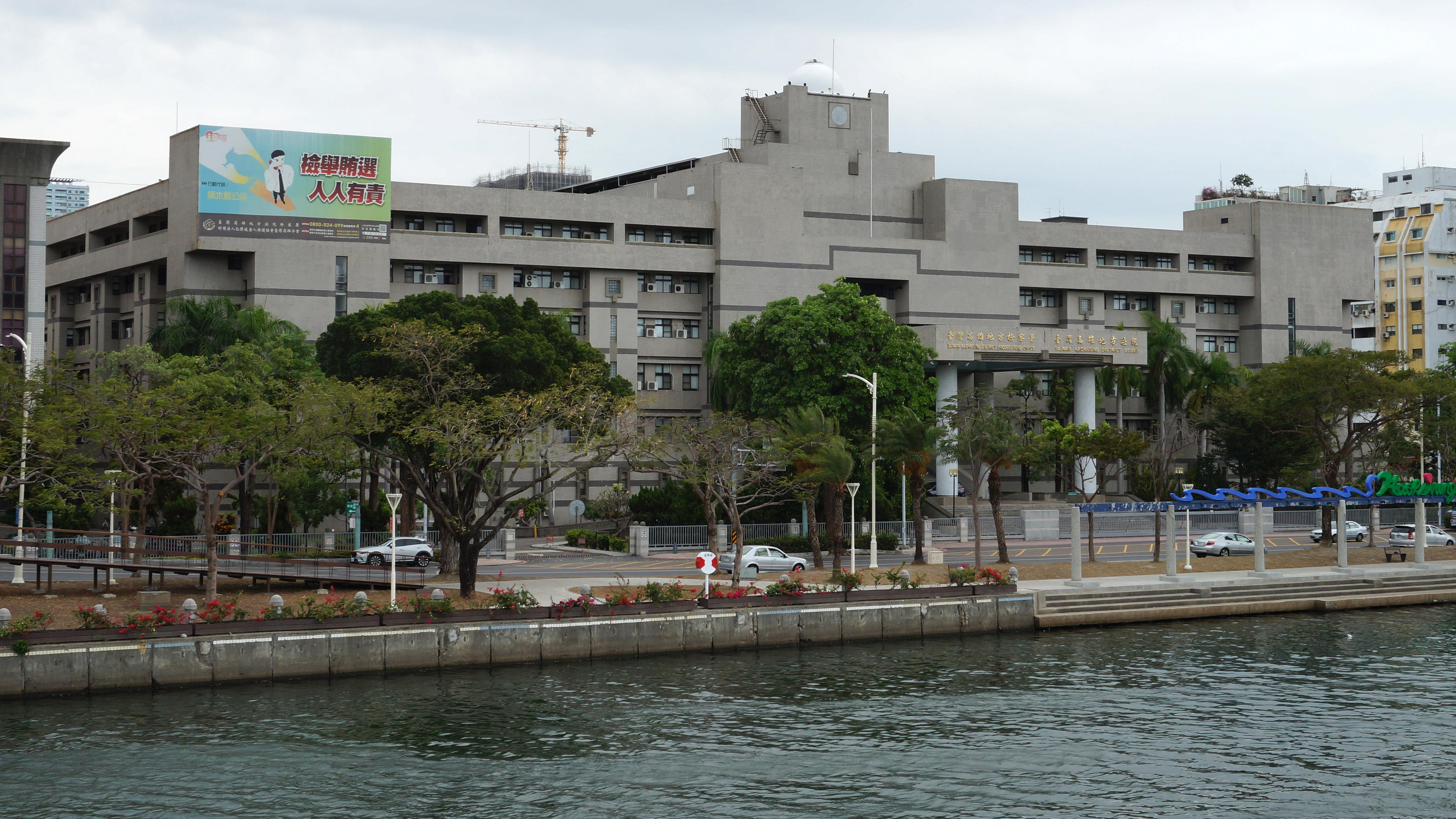 臺灣高雄地方法院大樓，為臺灣高雄地方法院與臺灣高雄地方檢察署合署辦公地，地址：高雄市前金區河東路188號。